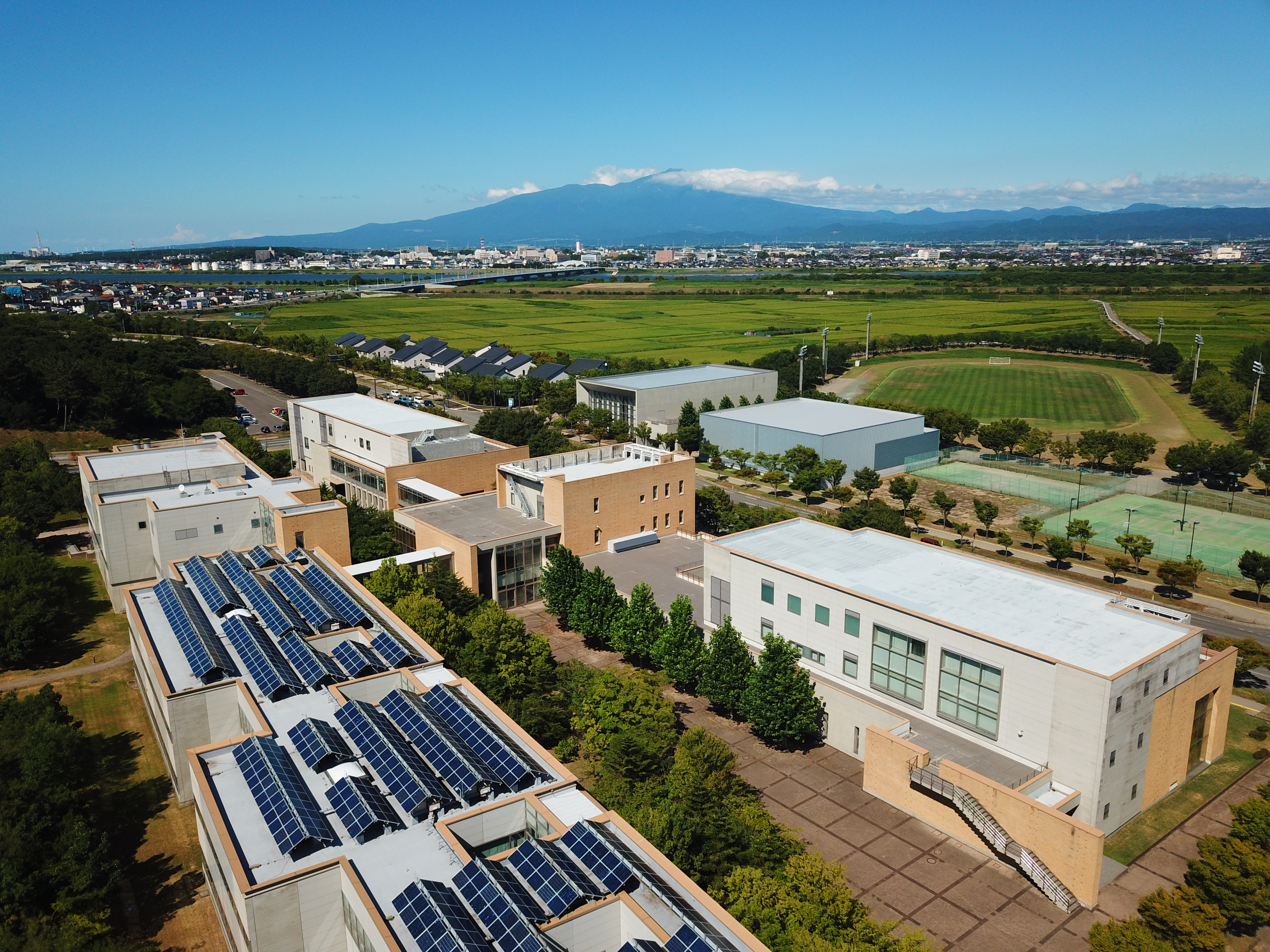 酒田キャンパスをドローンにて撮影しました